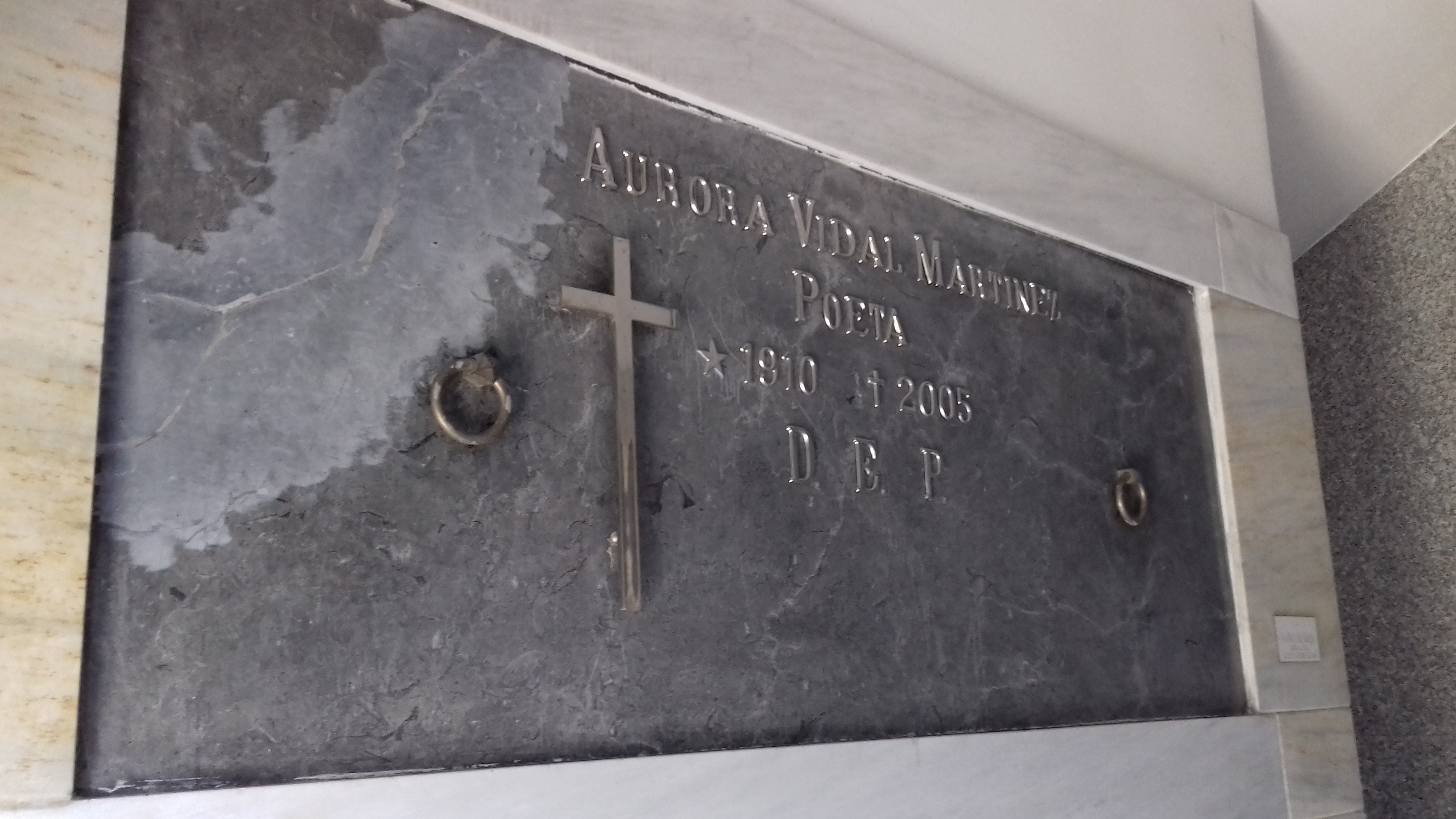 Lápida de Aurora Vidal Martínez